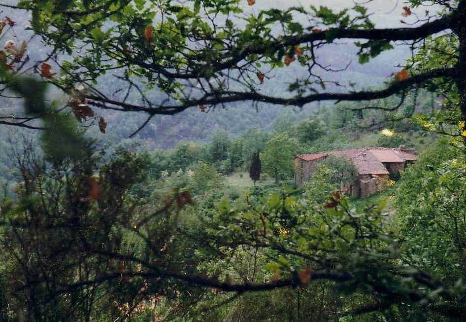 Blick auf das Refugium von Gustl Angstmann in der Toscana